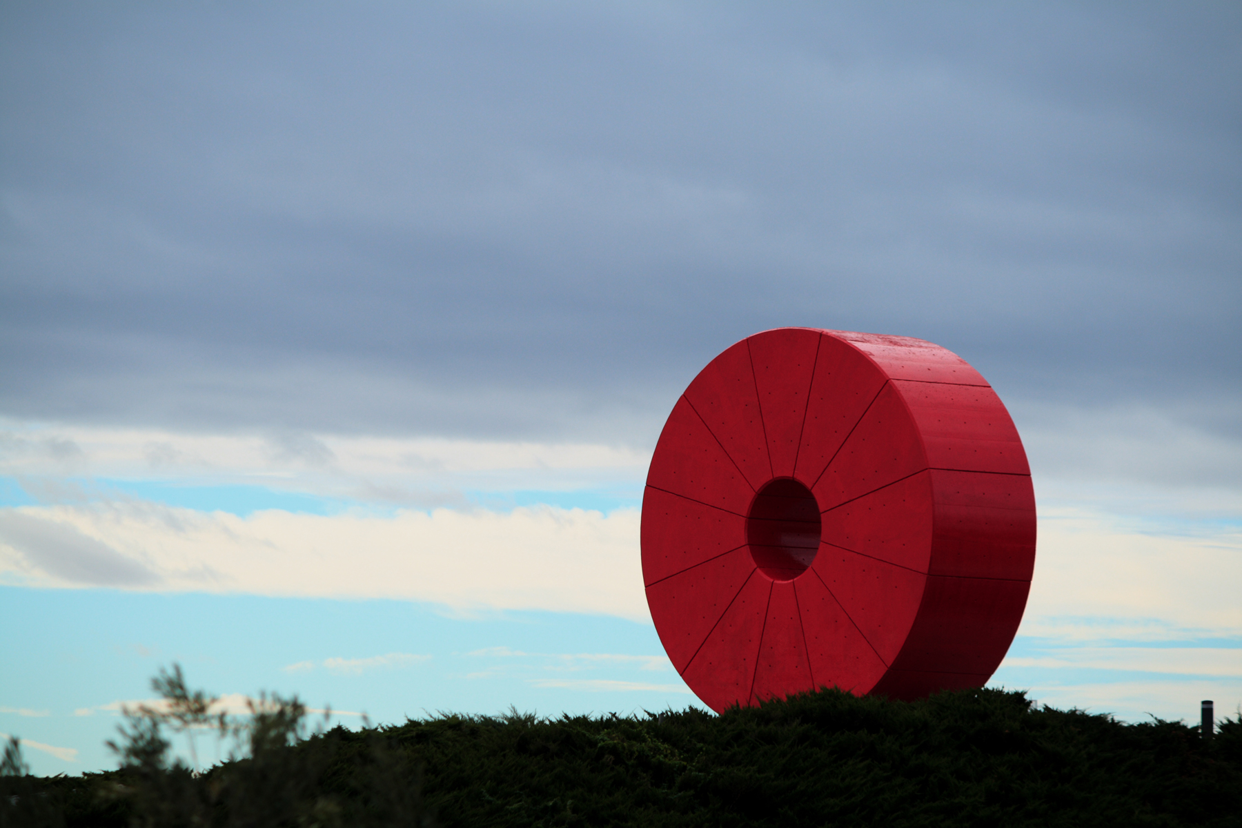 ESPACIO MEXICO DEL PUEBLO Y EL GOBIERNO DE LA CIUDAD DE MEXICO A LA CIUDAD DE MADRID INAUGURADO POR EL PRESIDENTE DE MEXICO CASLOS SALINAS DE GORTARI 23 DE JULIO DE 1992 Parque Juan Carlos I Madrid Comunidad de Madrid España